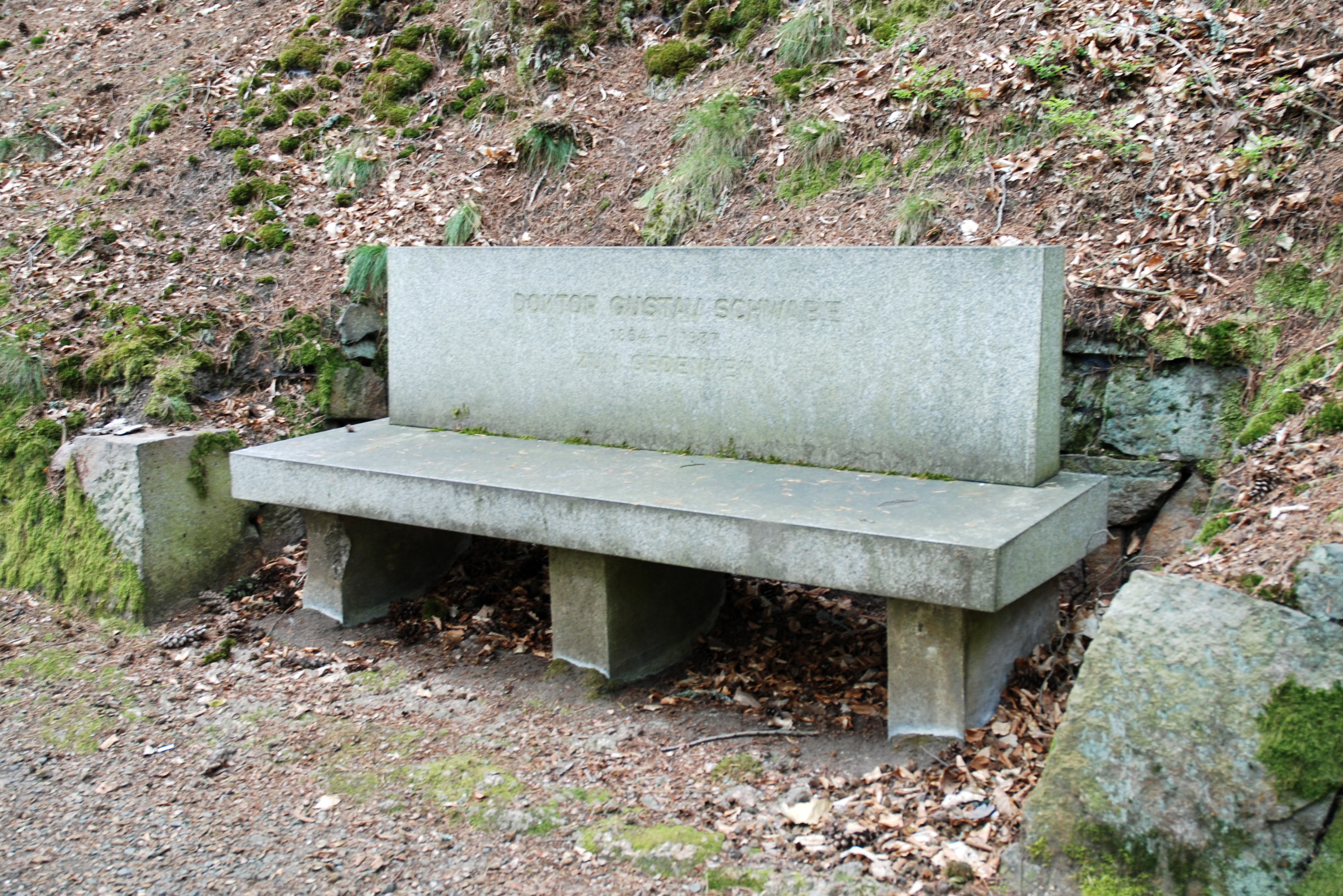 Schwabeho lavička v karlovarských lázeňských lesích